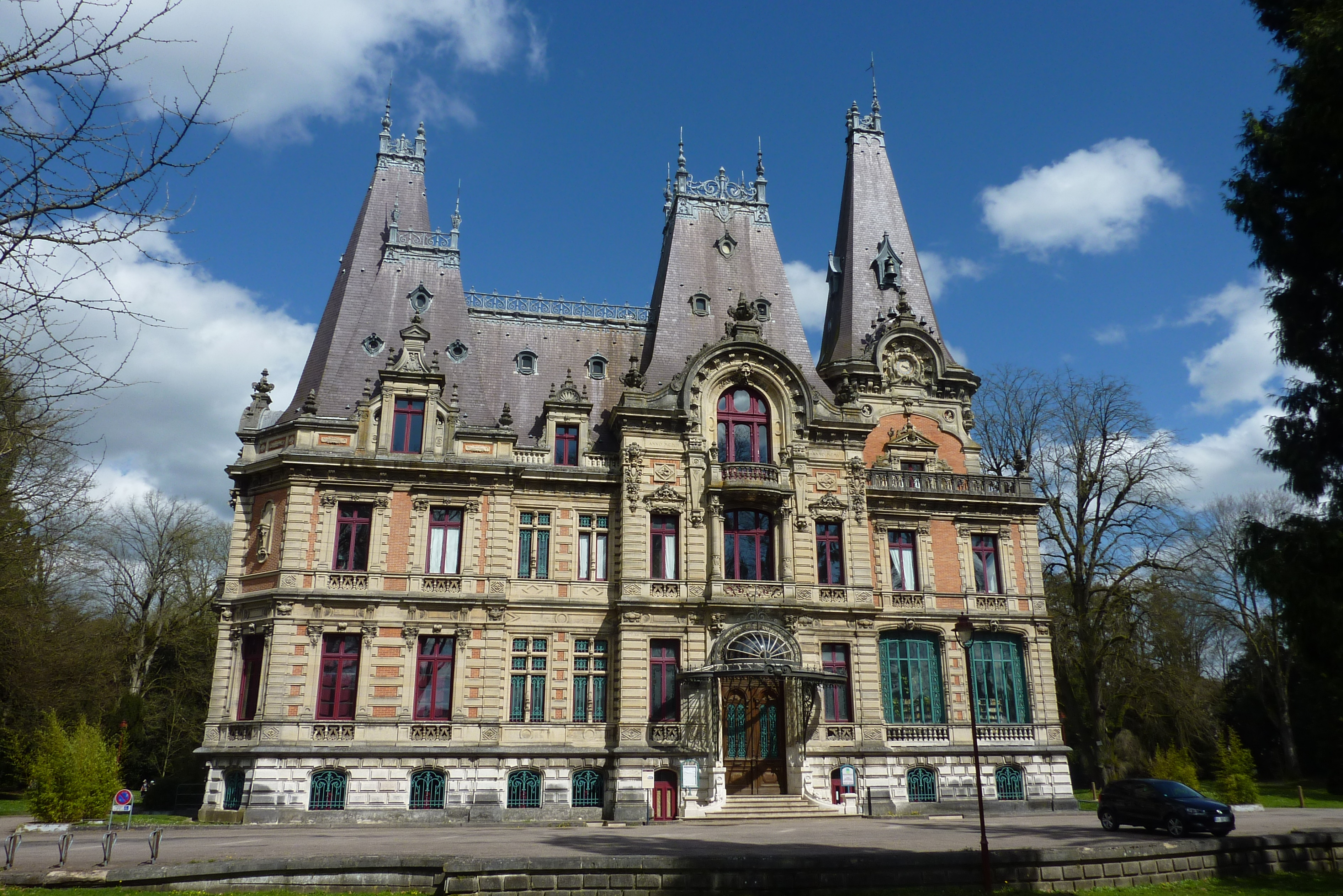 Façade avant du Château de Marbeaumont de Bar-le-Duc.